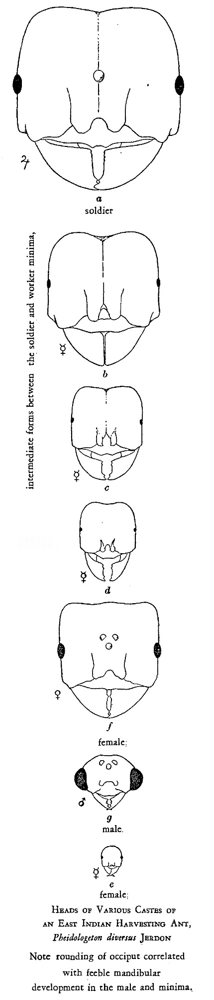 Ant heads in Pheidologeton diversus